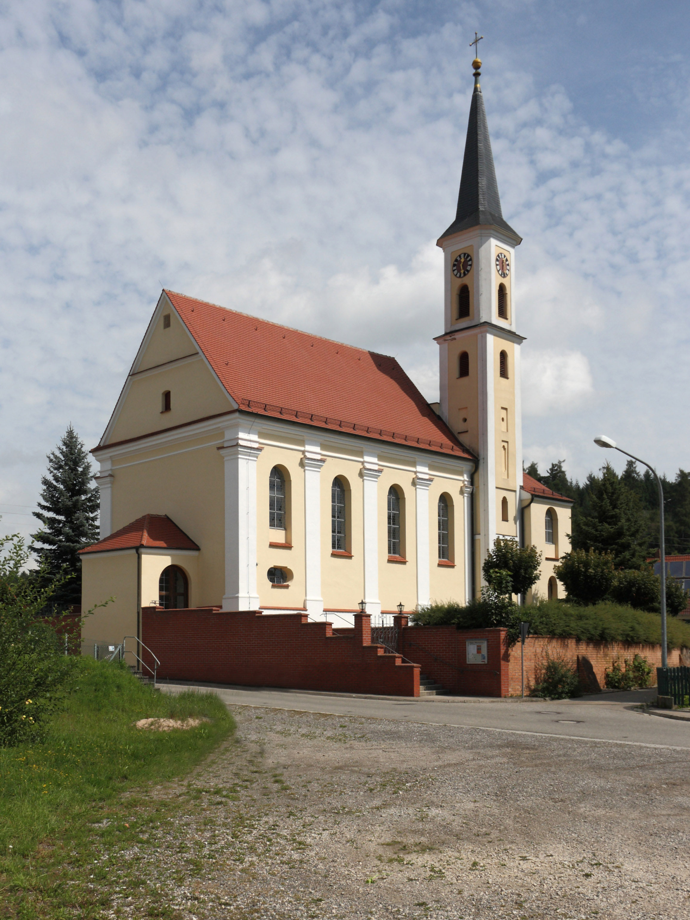 Kath. Pfarrkirche St. Thomas von Canterbury in Edenhausen; Ansicht von Südwesten